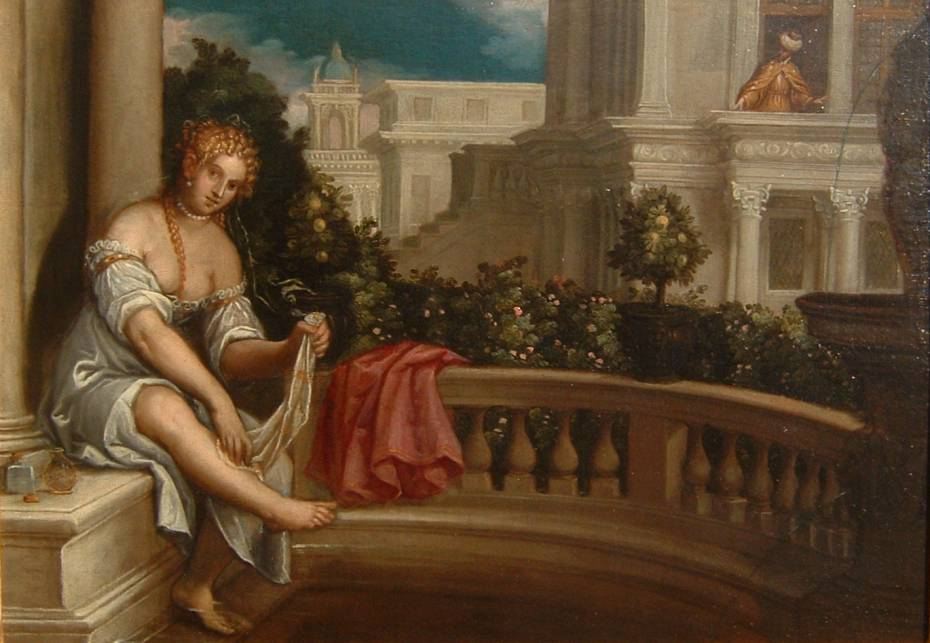 Betsabea al bagnotitle QS:P1476,it:"Betsabea al bagno" label QS:Lit,"Betsabea al bagno"